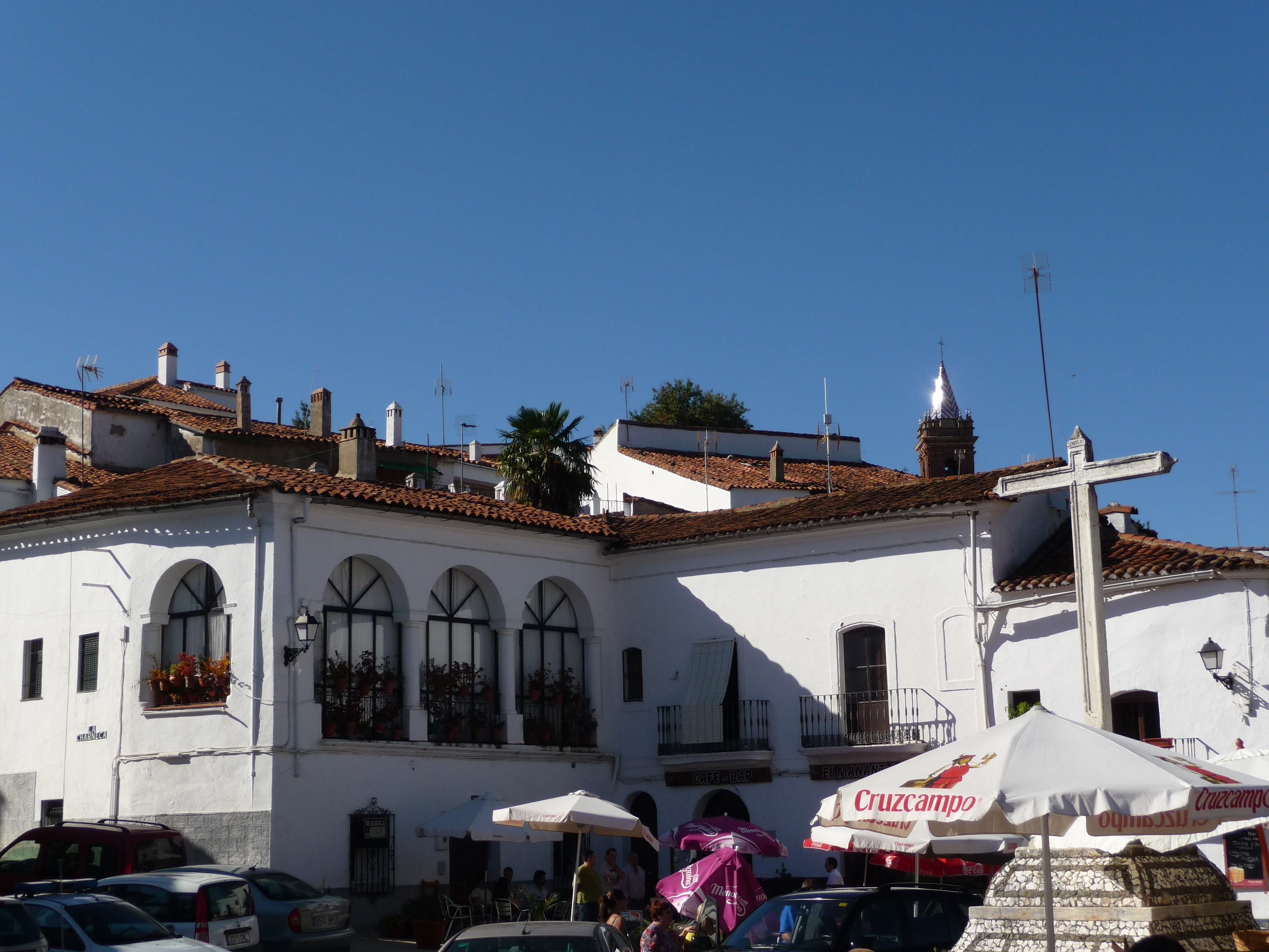 Fuenteheridos, provincia de Huelva (España)